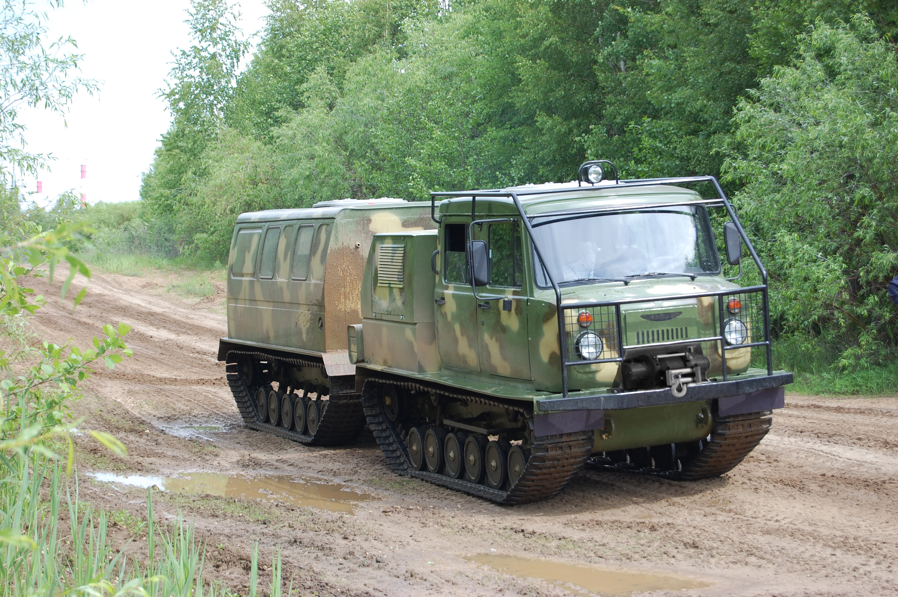 Гусеничный снегоболотоход ГАЗ-3344, производства ЗАО "ЗЗГТ"